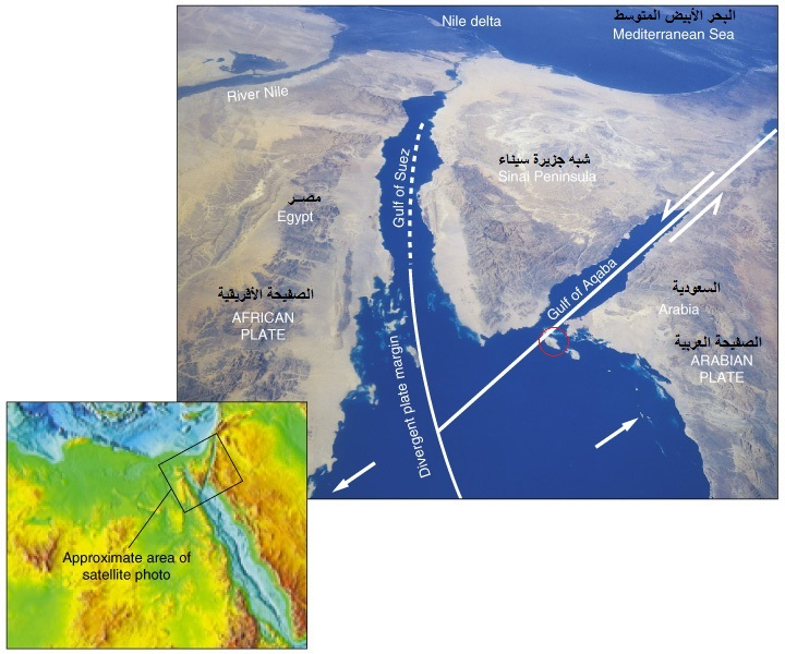 صدع البحر الميت، والذي يشمل وادي نهر الأردن، و يفصل صحيفة شبه سيناء عن الصحيفة العربية.